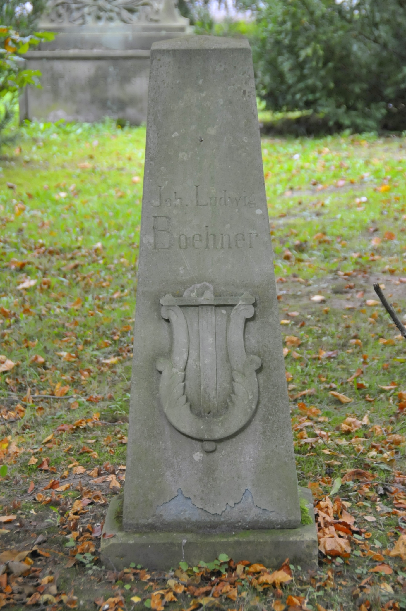 Grabstein von Johann Ludwig Böhner-CTH.JPG